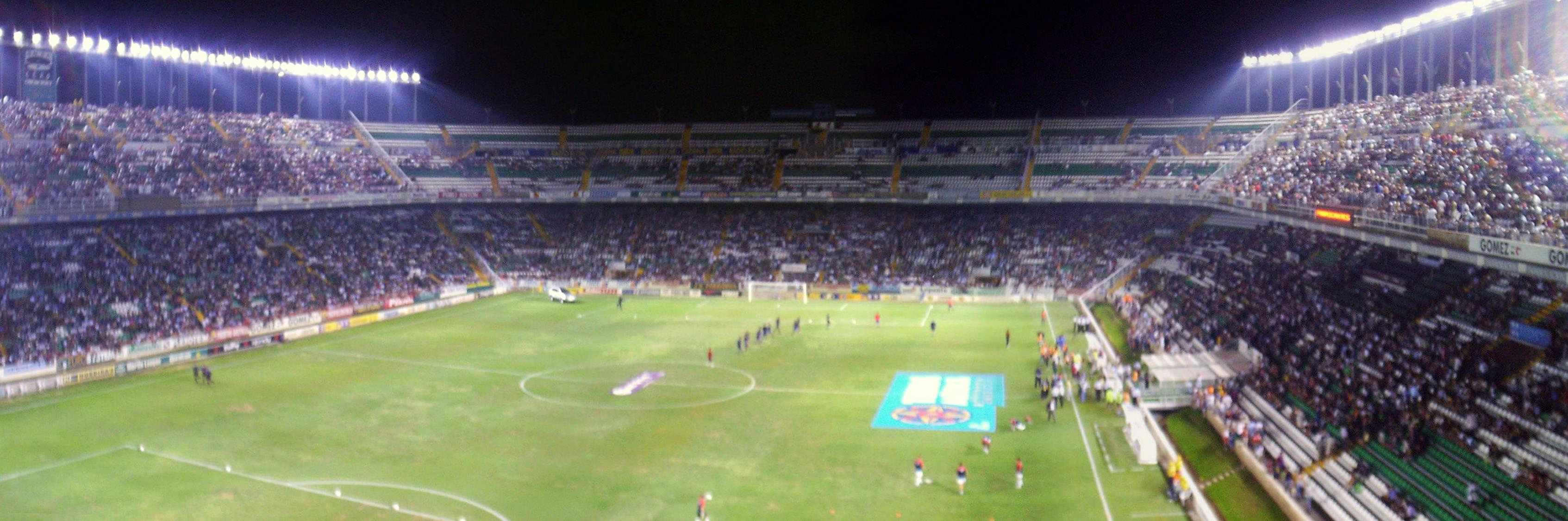 Visión del Estadio Martínez Valero durante un partido entre el Elche CF y el FC Barcelona en 2003.